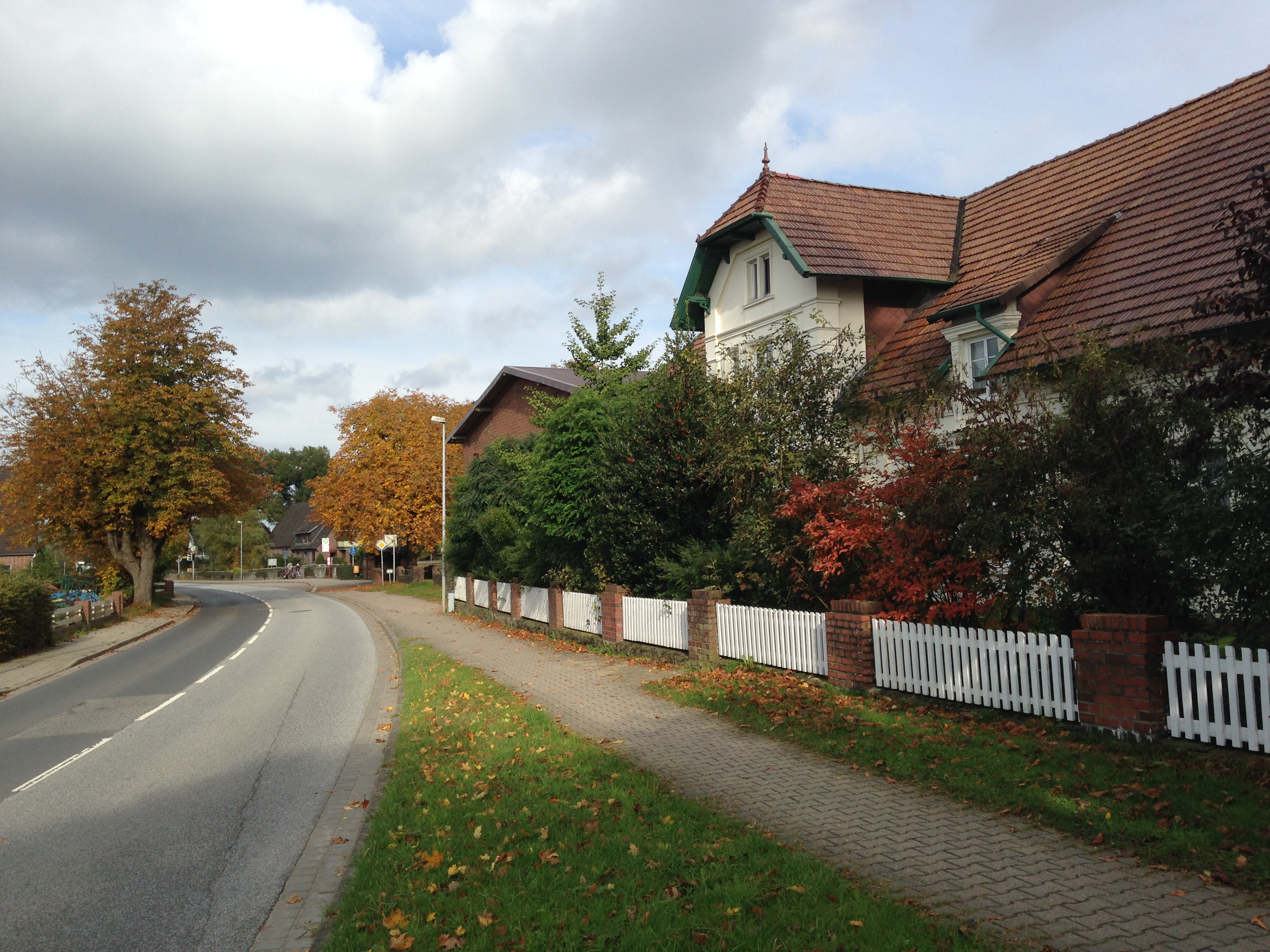 Ortsdurchfahrt Daerstorf